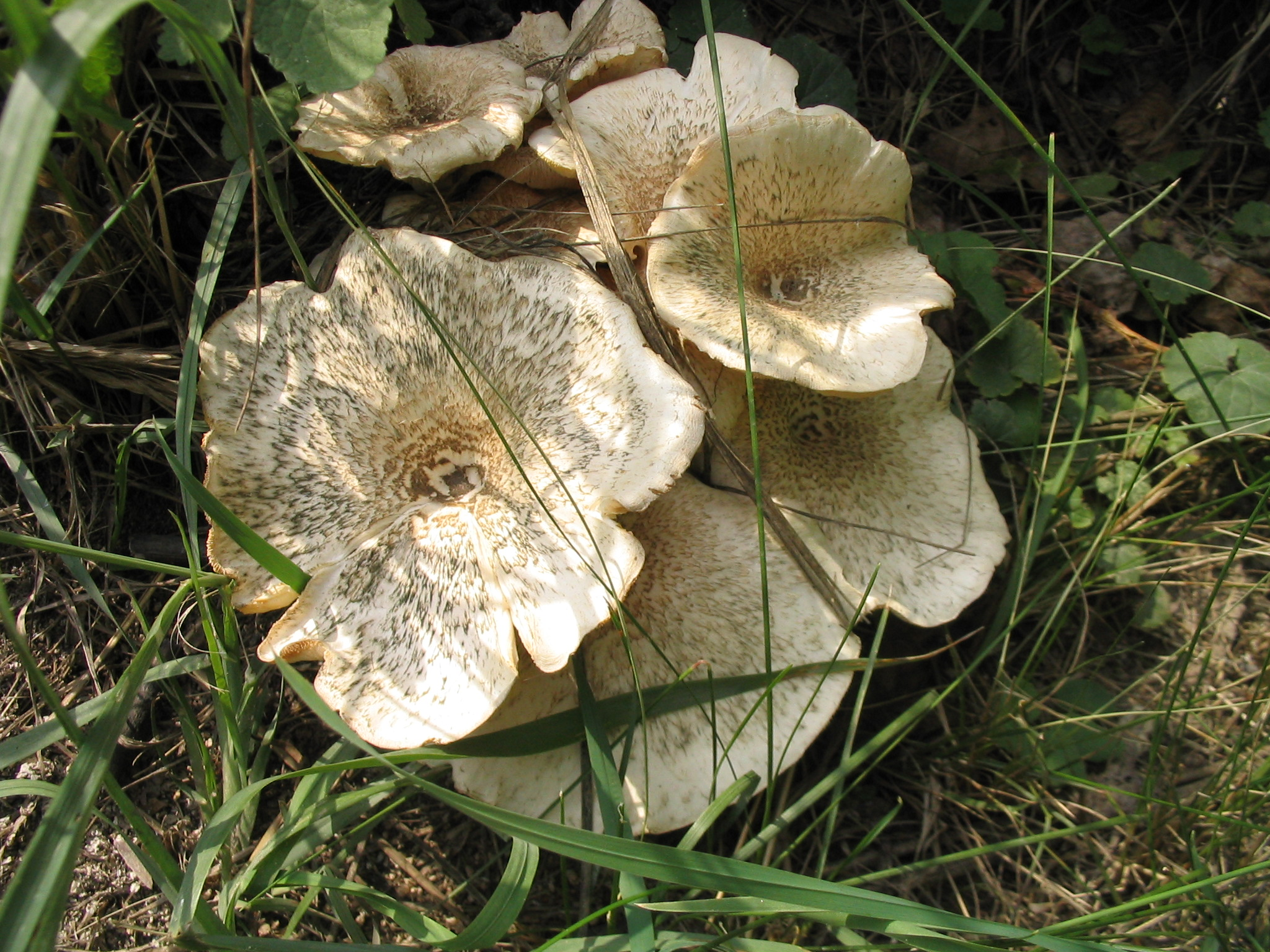 Getigerter Sägeblättling, Lentinus tigrinus, aufgenommen am 31.07.2004 von Dr. Hagen Graebner